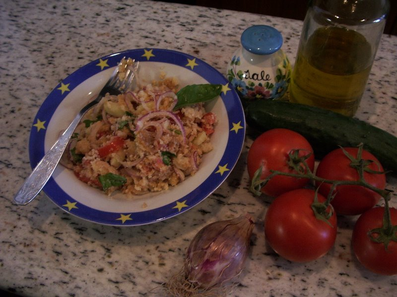 La panzanella : piatto povero tipico toscano